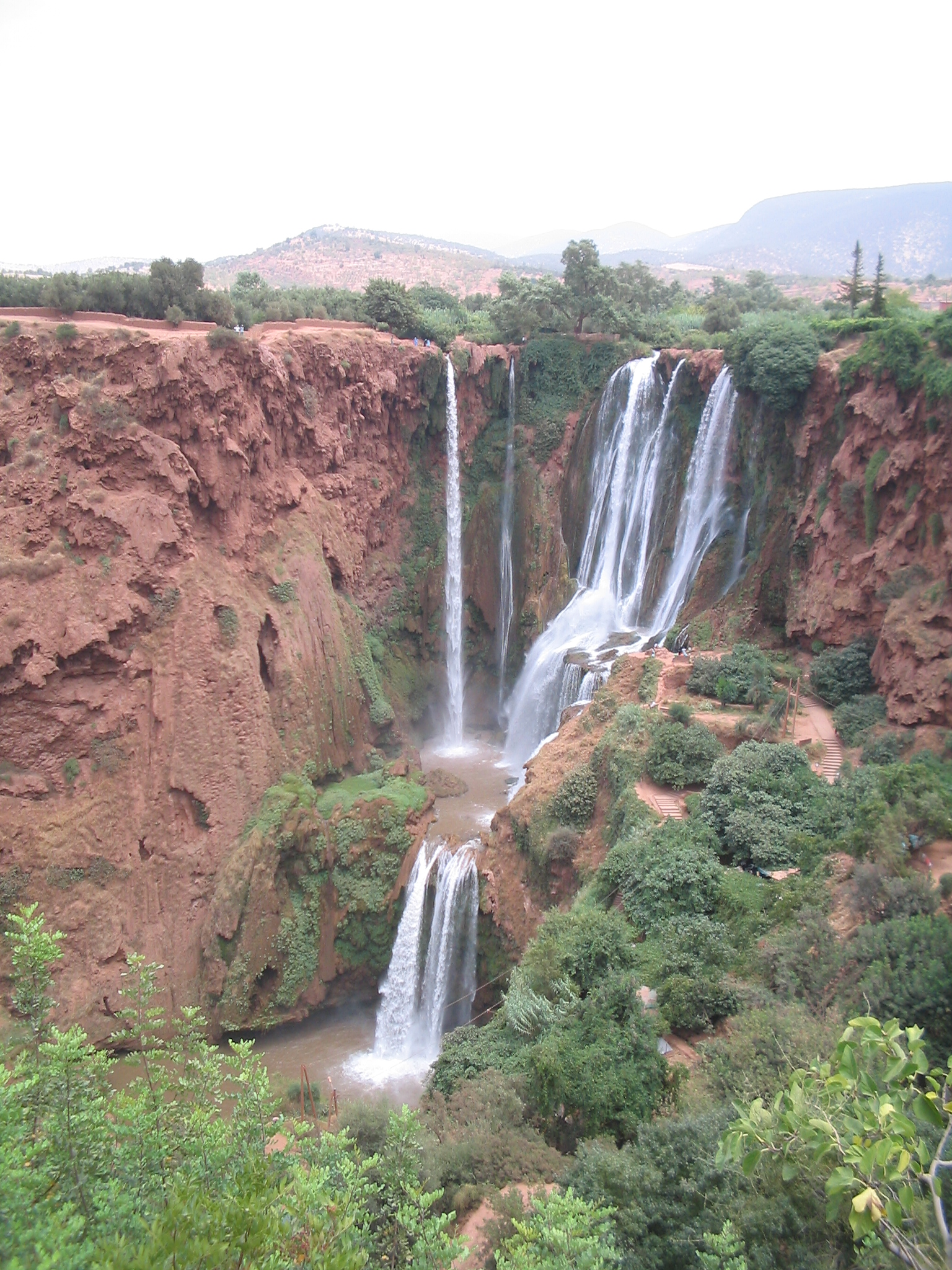 Waterval van Ouzoud. Eigen werk.